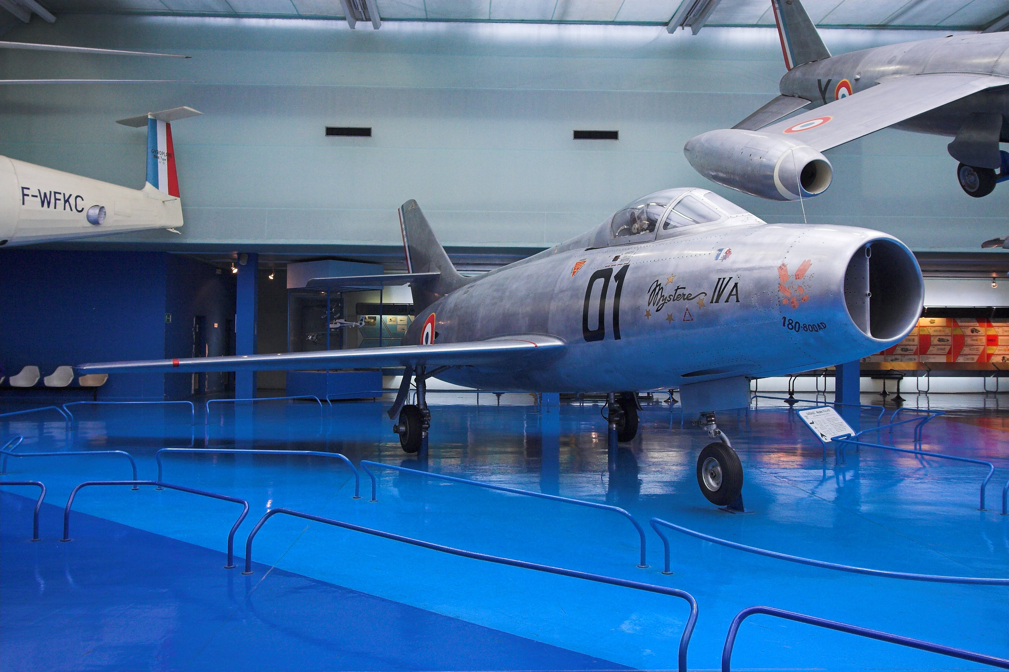 a French fighter Dassault Mystère IV.A(Musée de l'air et de l'espace, Le Bourget, France)